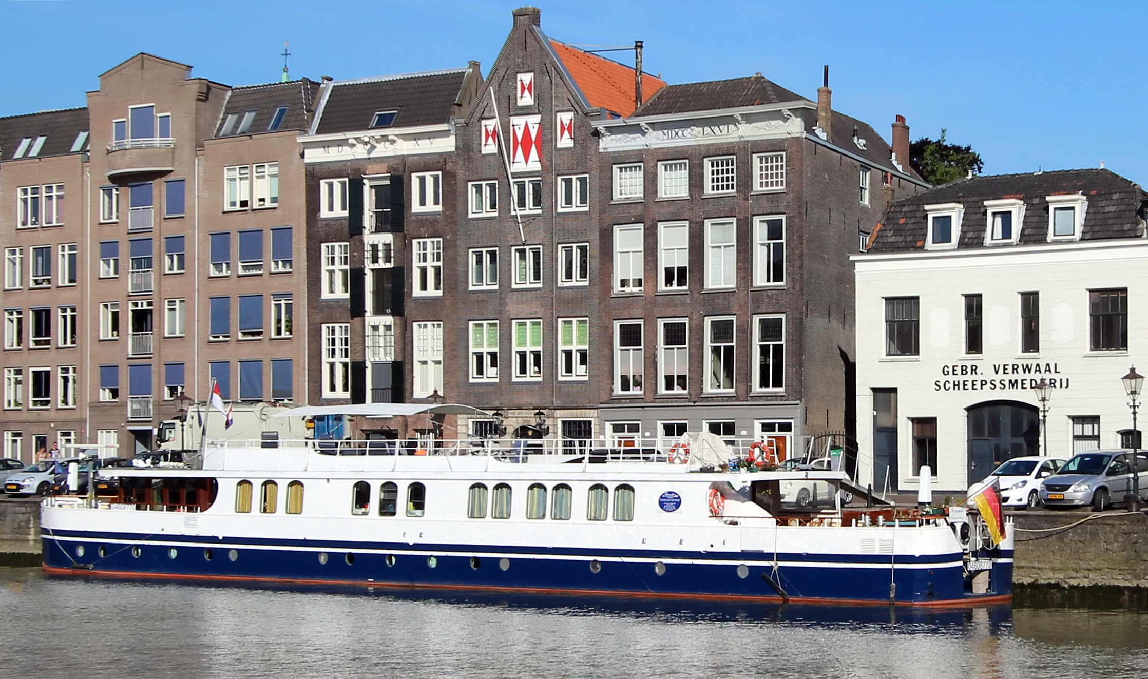 Kabinenenfahrgastschiff Serenité in Dordrecht